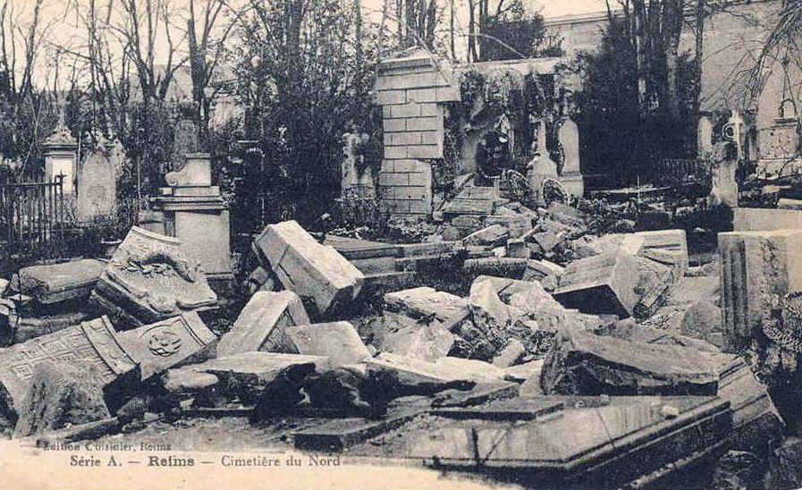 vue du ciemtière du nord.